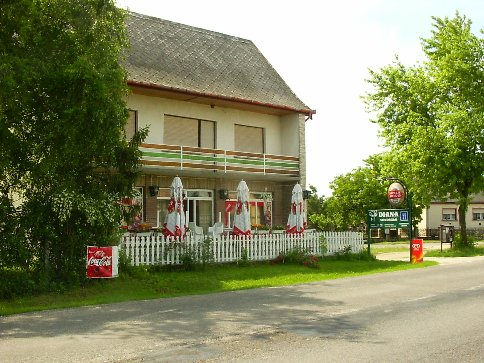 Vendéglő a 83-as út mentén Győrszemerén